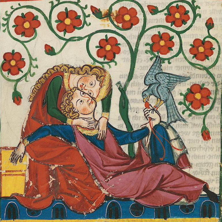 Codex Manesse, fol. 249v: Konrad von Altstetten